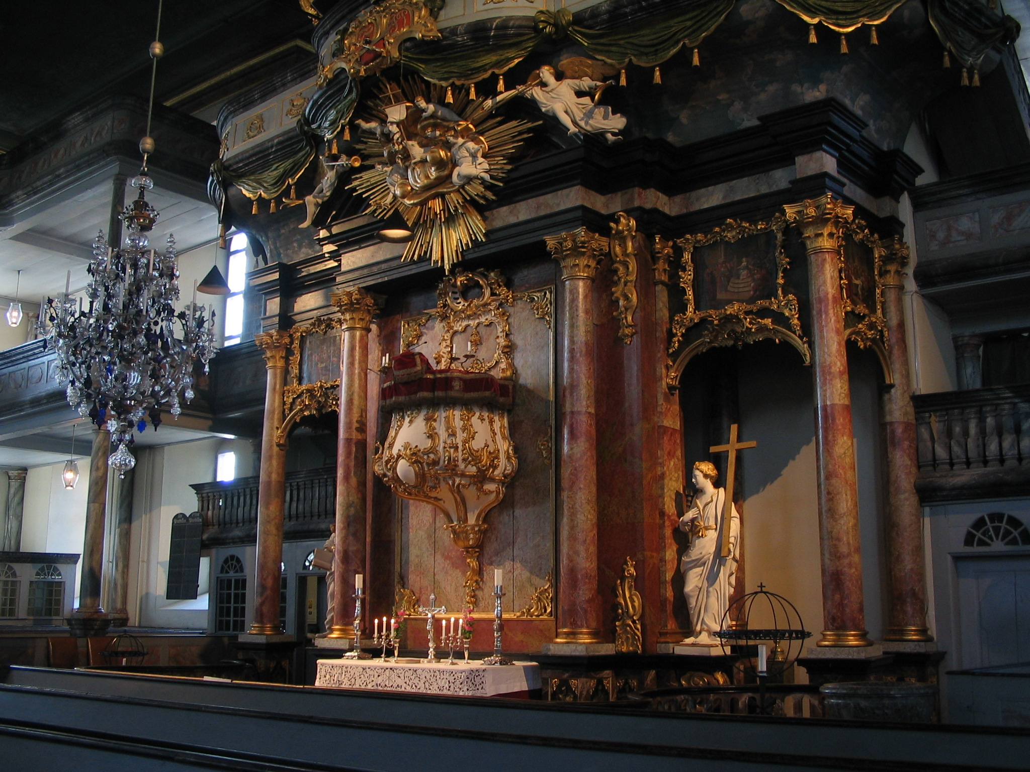 Kongsberg kirke - Alter og prekestol